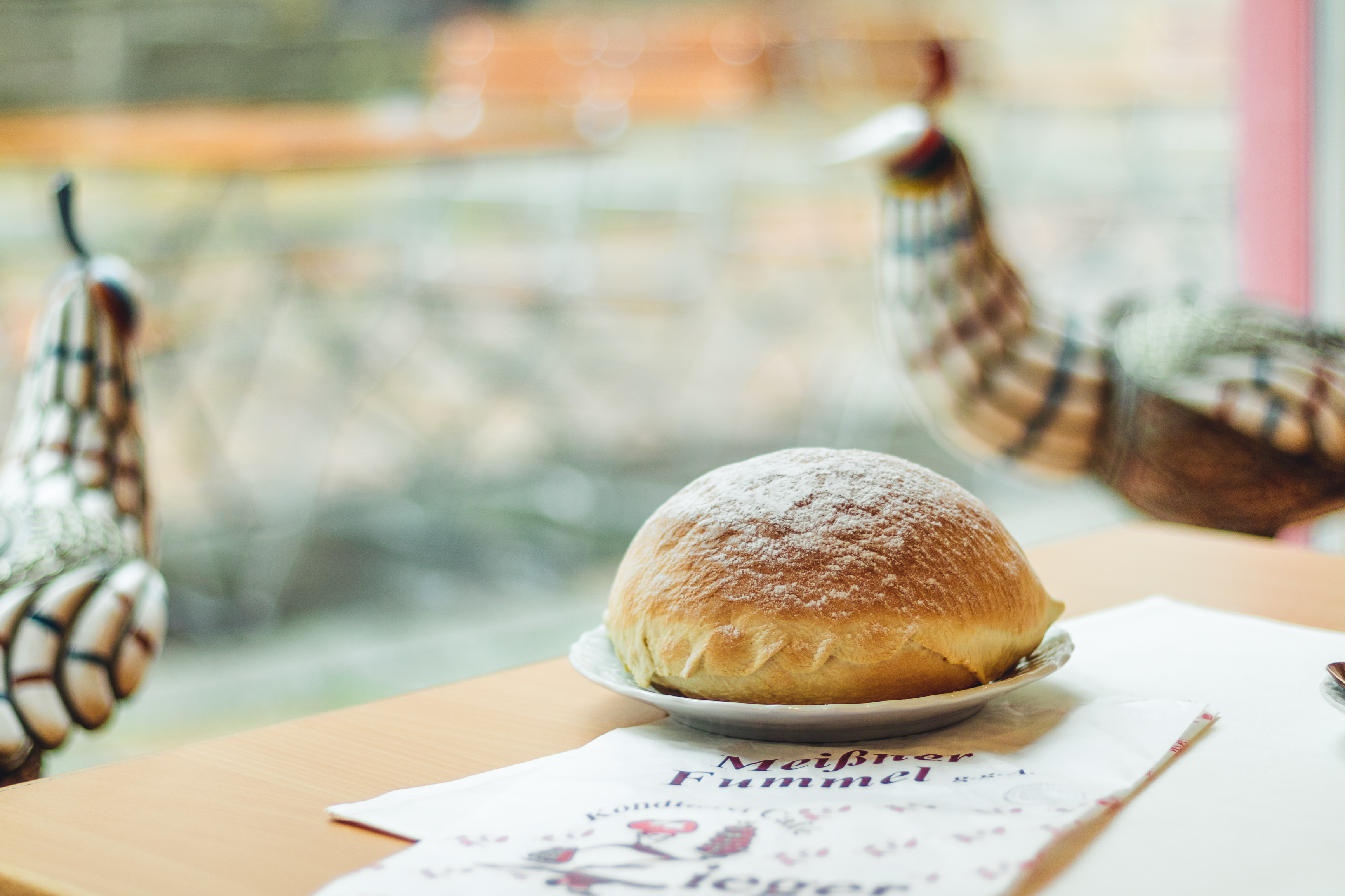 Projekt Kräutergarten und Klosterküche27. – 30. August 2015 Exkursion von Wikipedianern zur Klosterruine Heilig-Kreuz in Meißen und zum Kloster St. Marienstern in Panschwitz-Kuckau in Sachsen. Eingeschlossen sind Fotoarbeiten im Rahmen der Vorbereitung dieser Exkursion in anderen Kräutergärten sowie Denkmalfotos in den Regionen The making of this document was supported by the Community-Budget of Wikimedia Germany.